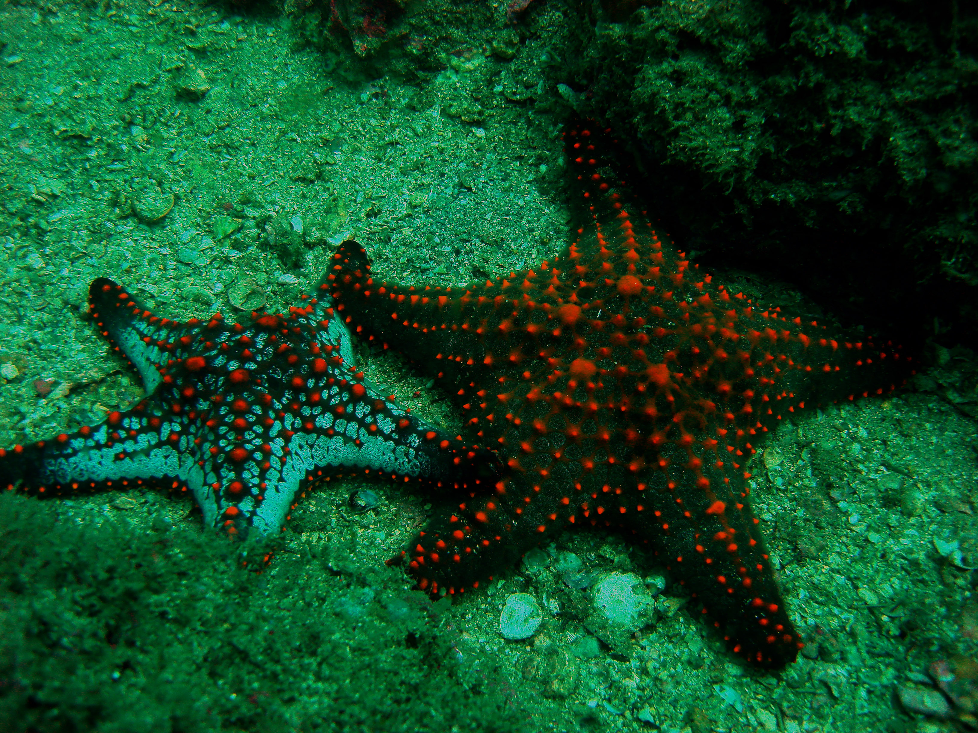 Picture - Starfish - Estrela do Mar